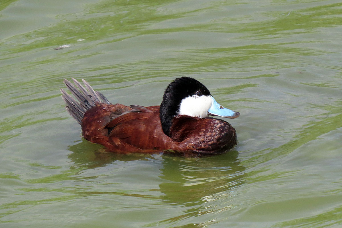 Oxyura jamaicensis jamaicensis 14 mar 16 Turnbull, Texas